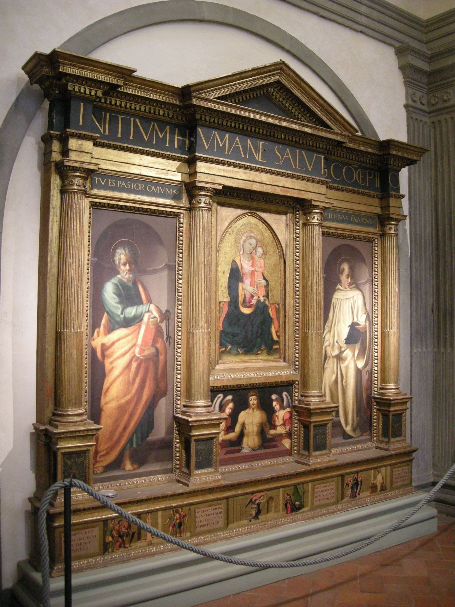 Oratorio dei bini, ancona di baccio d'agnolo, con pannelli di rossello di jacopo franchi (madonna), maestro di serumido (pietà e predella) e pier francesco foschi (lati)